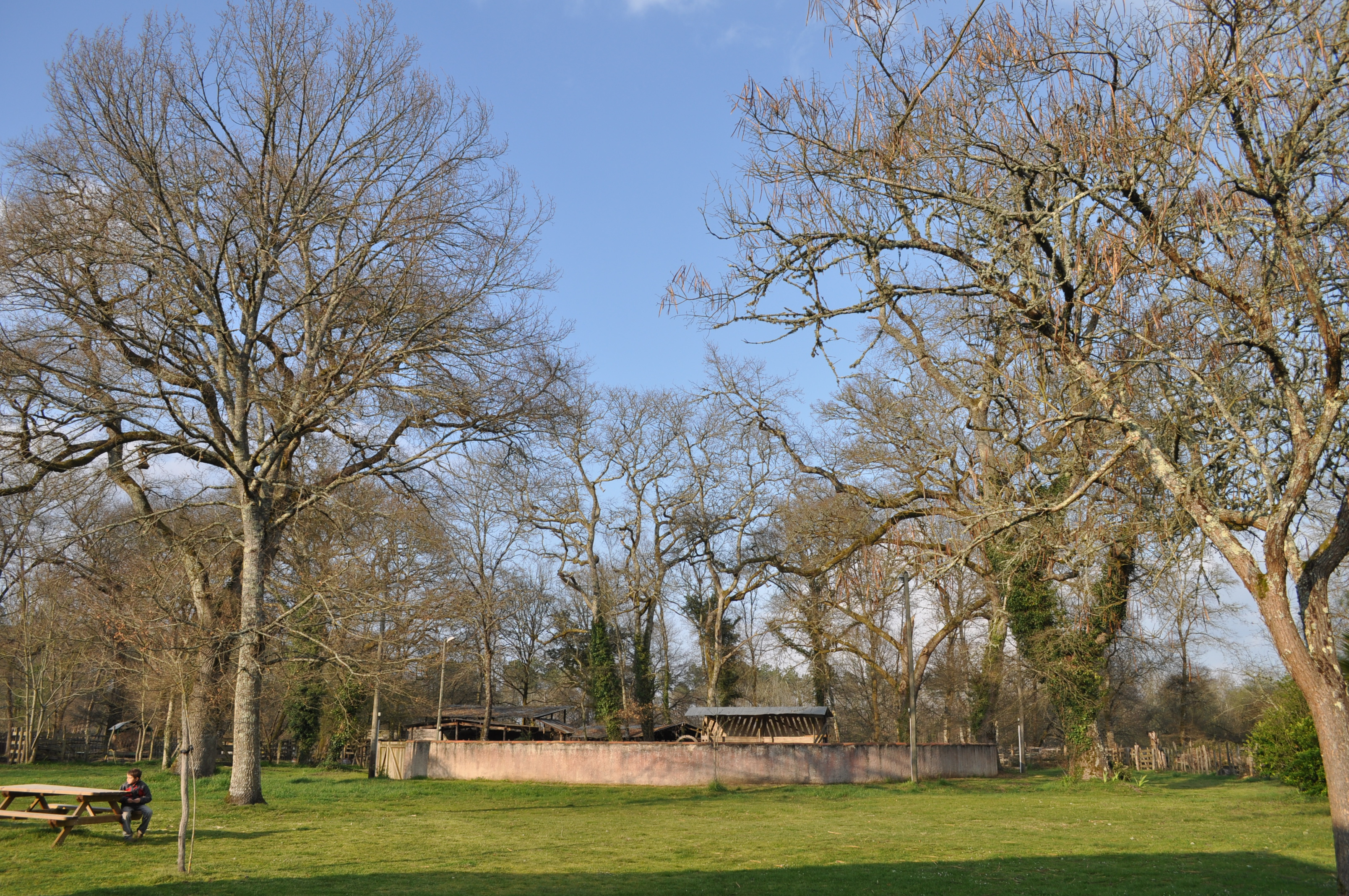 Arènes de control de la qualité des taureaux d’élevage.